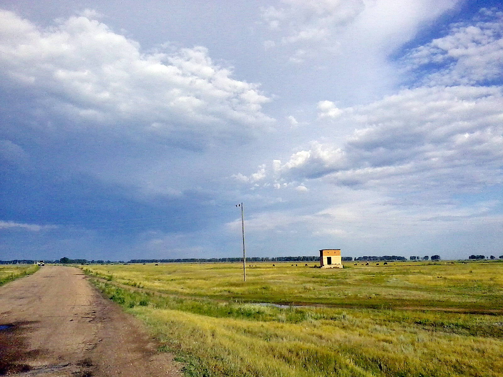 Окрестности города Рубцовска близ реки Алей.